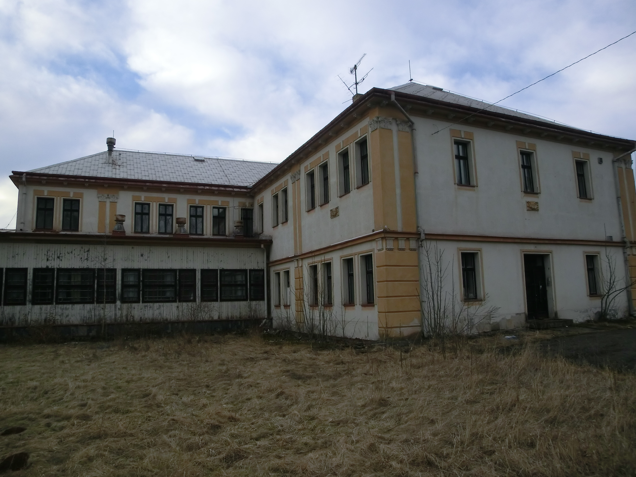 Zámek ve Studenci byl v 80. letech přestavěn na školicí a rekreační středisko závodů Chemopetrol Litvínov, od roku 2002 je uzavřen a rychle chátrá.